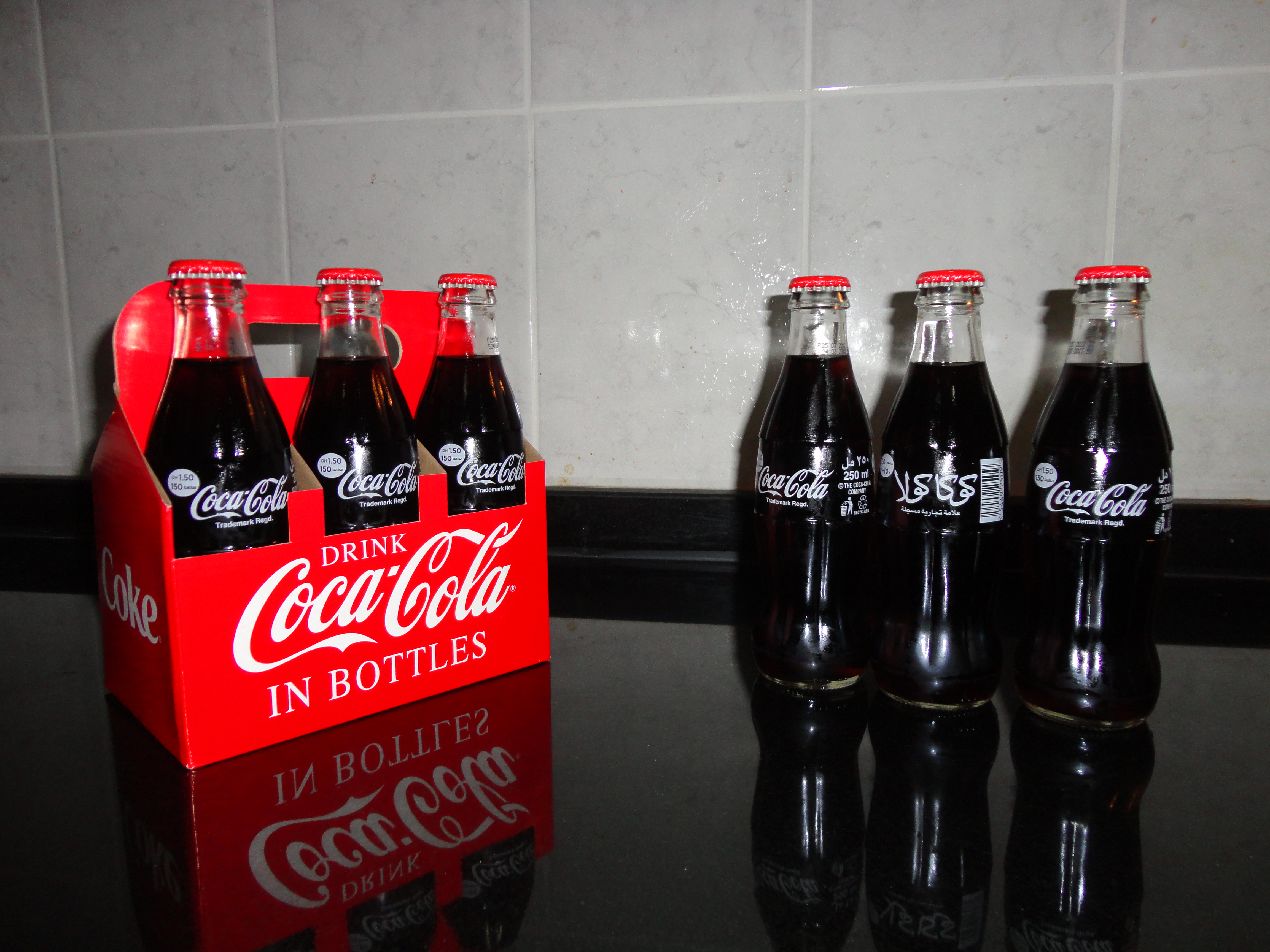 بسته بندی ۶ تایی نوشابه کوکا کولا که در دبی با قیمت ۹ درهم به فروش می رسد.